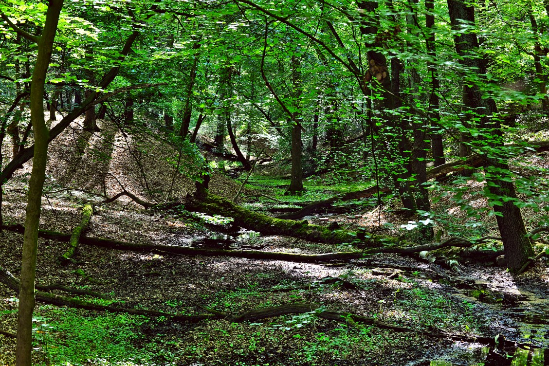 Im NSG Königsbüscher Wäldchen entspringt ein Bach, der in den Oelbach mündet.